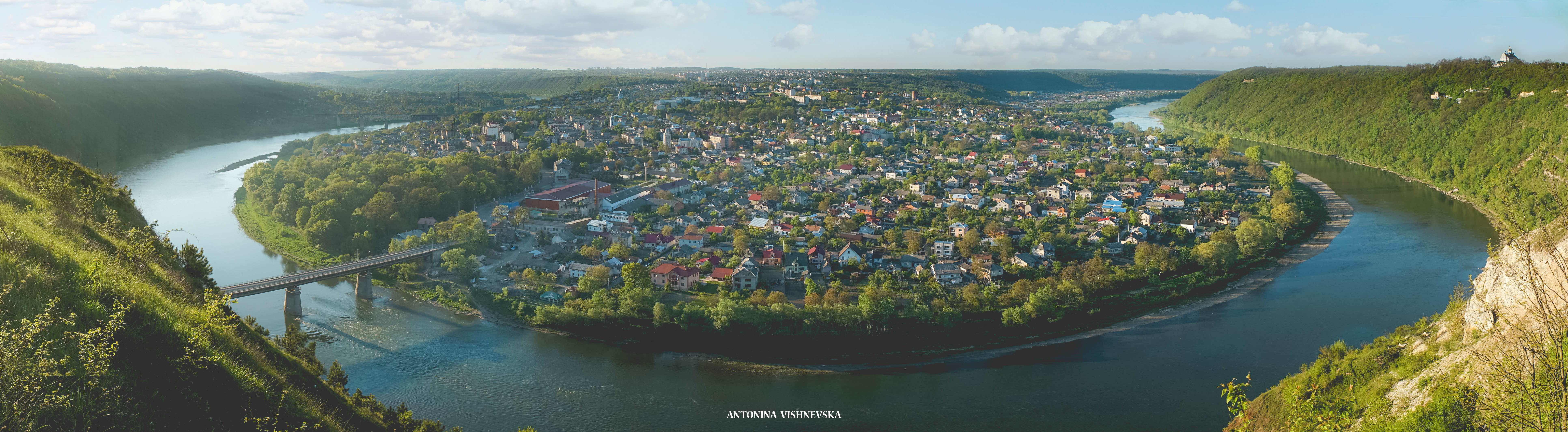 «Дністровський каньйон» біля м. Заліщики. Панорама міста.